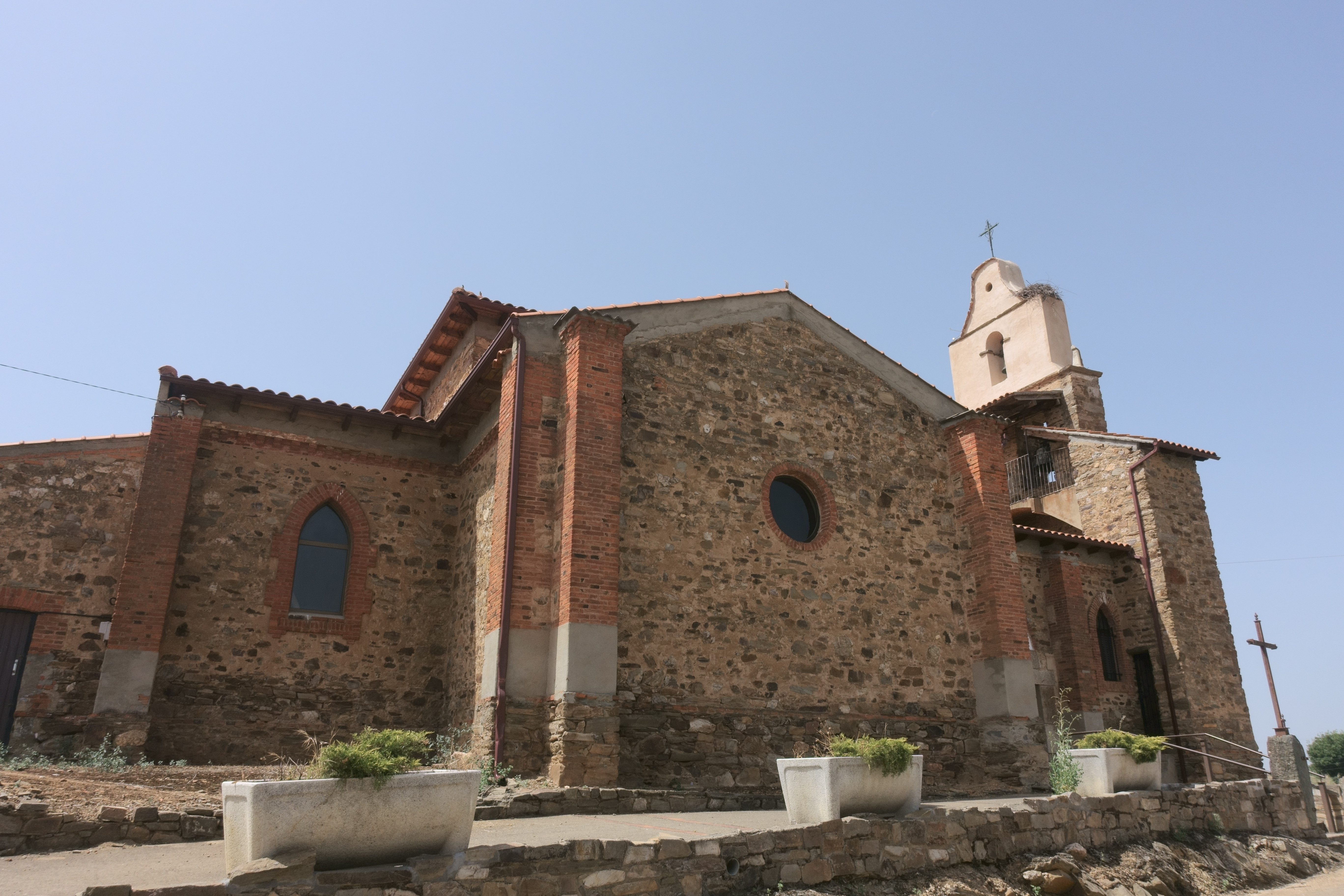 Iglesia de Santa Elena, en Santa Elena de Jamuz (León, España).